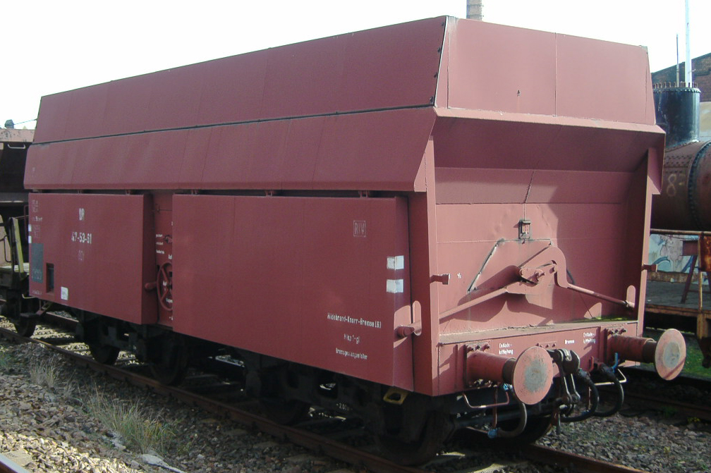 Offener Güterwagen mit sattelförmigem Wagenboden, Dok.-Nr. 0756 der DR, hier mit Aufsätzen zur Vergrößerung des Laderaums versehen